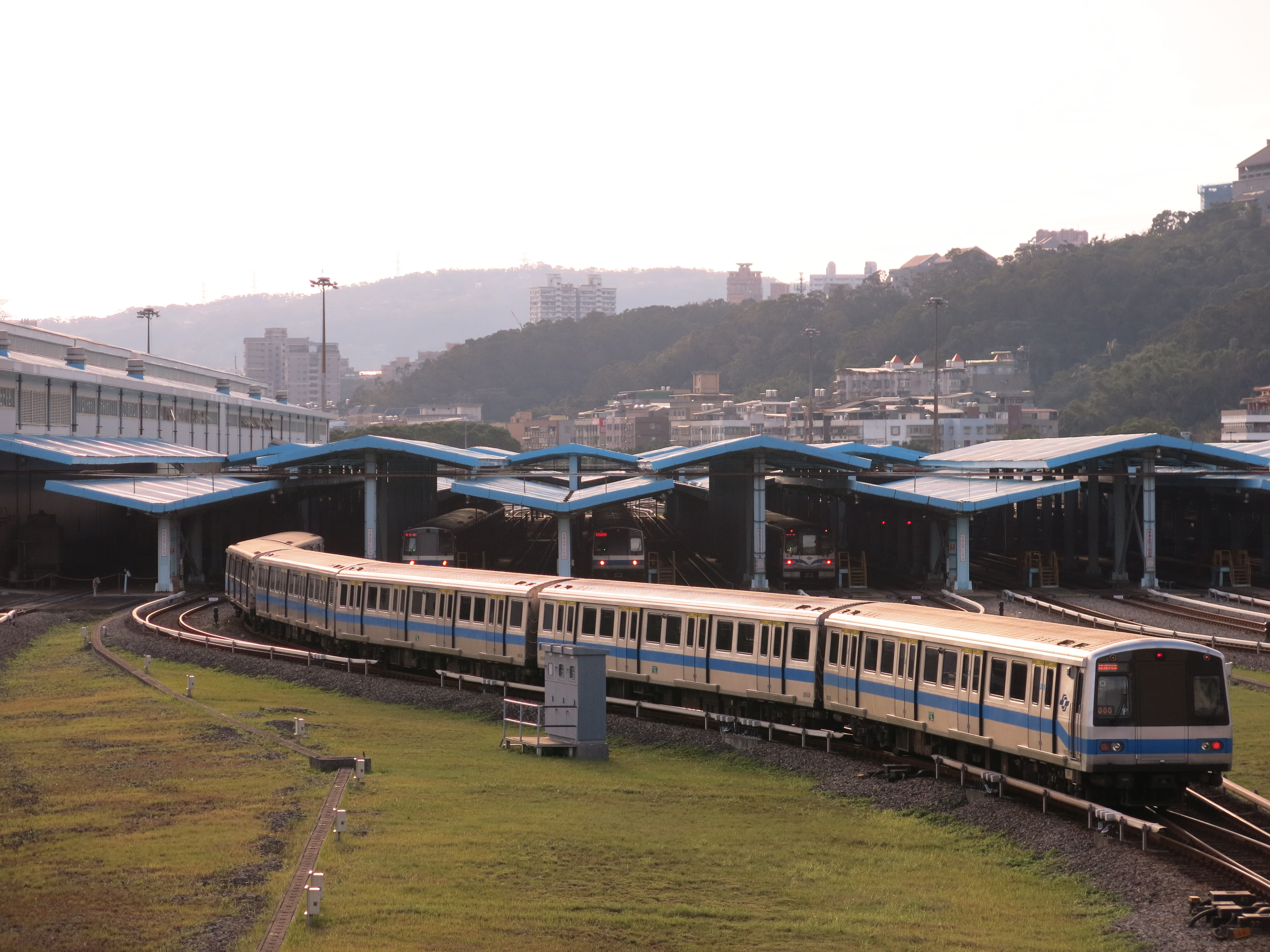 中文（台灣）: 台北捷運301型電聯車於北投機廠進行調度作業